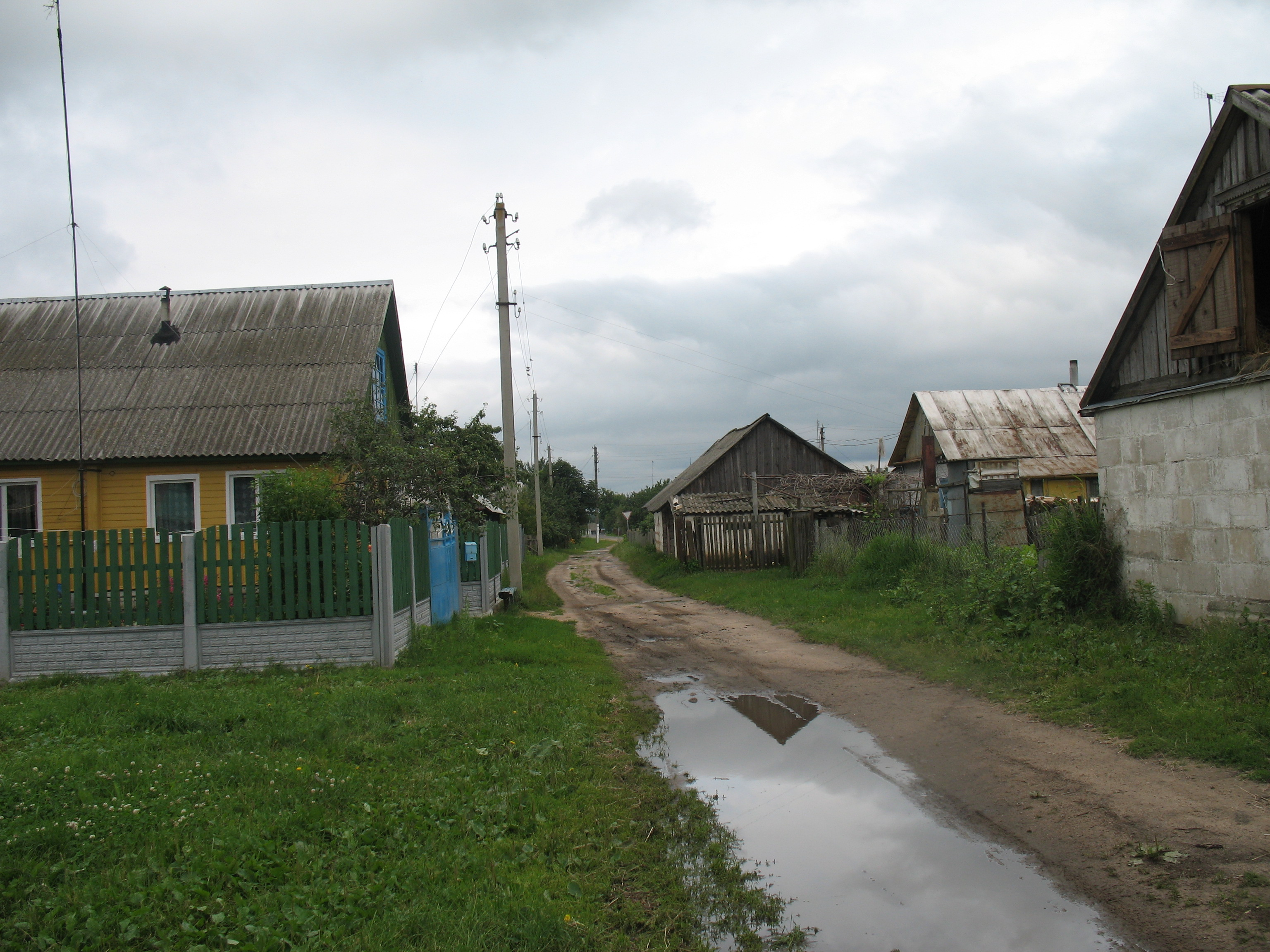 Здесь было гетто в поселке Уречье Любанского района Минской области.